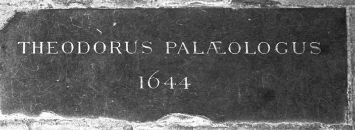 Lapide tombale di Teodoro Paleologus [figlio] nella cappella di San Michele dell'abbazia di Westminster Fu sepolto lì, non per la sua discendenza imperiale, ma perché aveva combattuto nella guerra civile (1642-1651) nell'esercito di Oliver St. John dalla parte dei parlamentari contro i realisti.